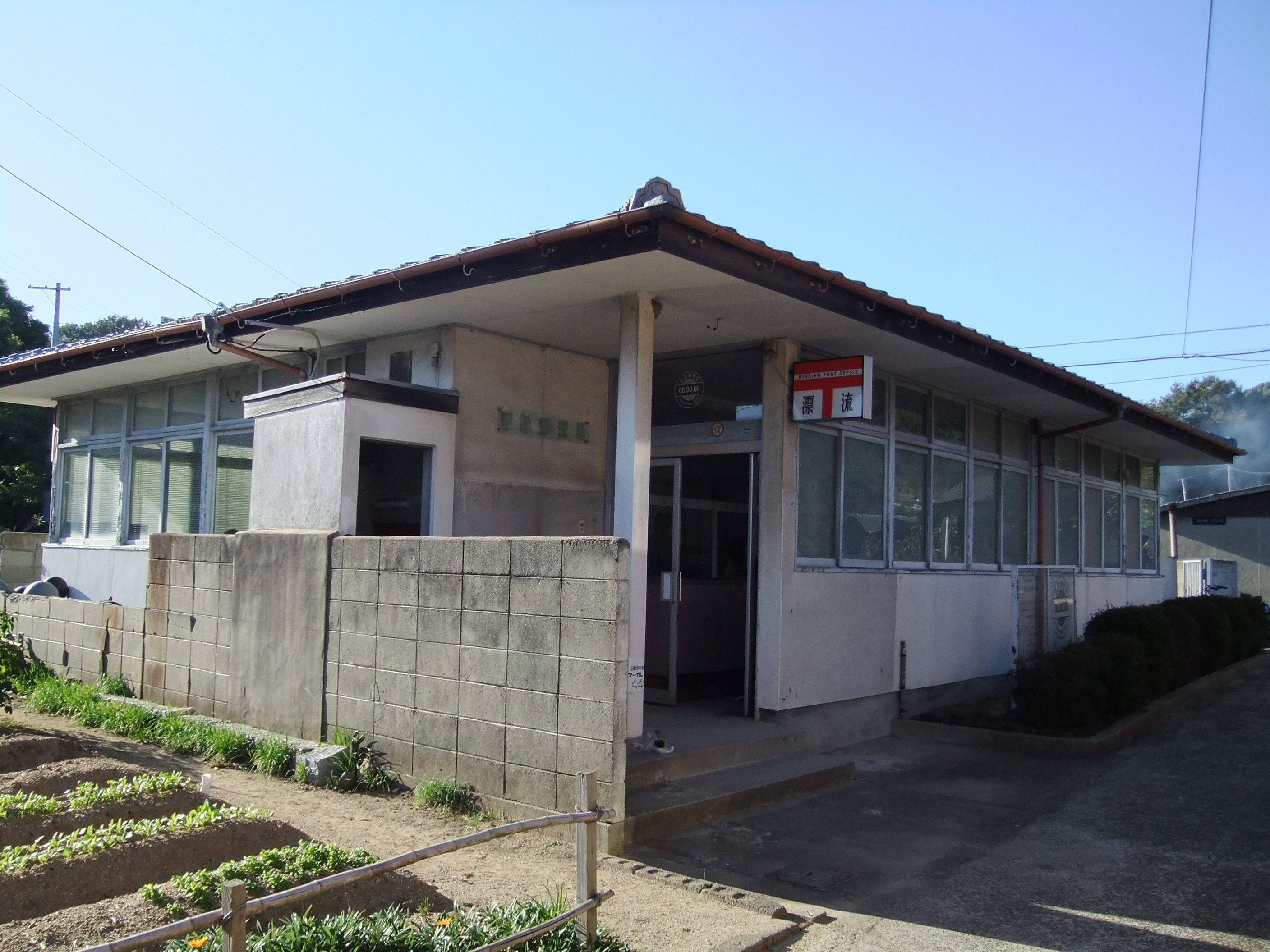 香川県三豊市詫間町粟島にある芸術作品（アートプロジェクト）「漂流郵便局」の局舎です。